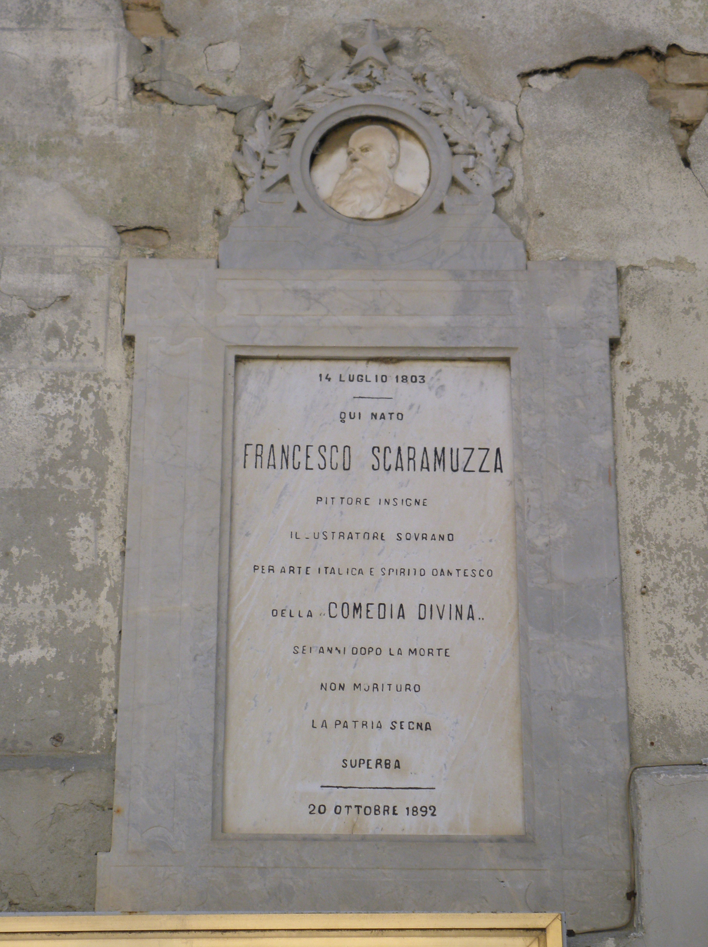 Sissa, già comune autonomo e frazione di Sissa Trecasali: la lapide posta sulla casa natale del pittore e poeta Francesco Scaramuzza.